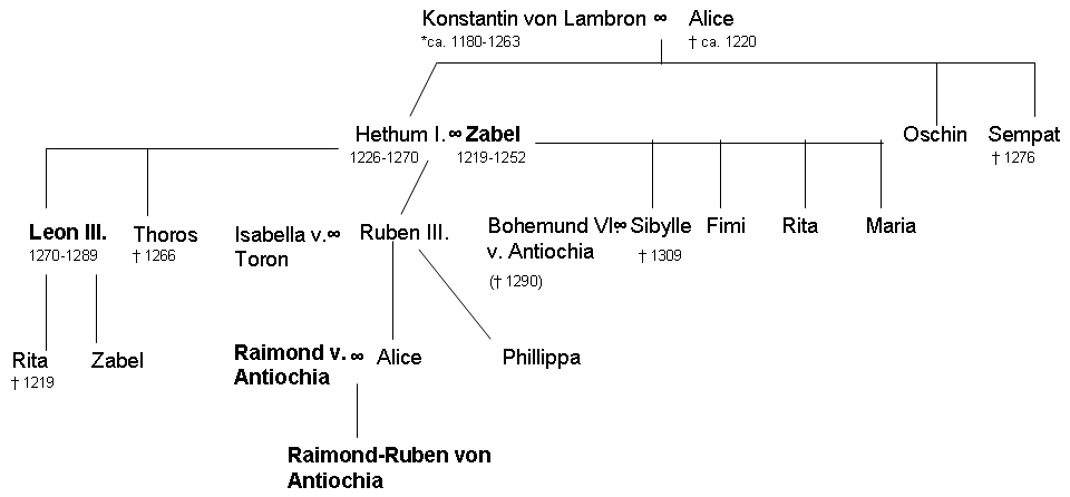 Abstammung Raimund Rubens mütterlicherseits, nach Angaben von Runciman und Boase.